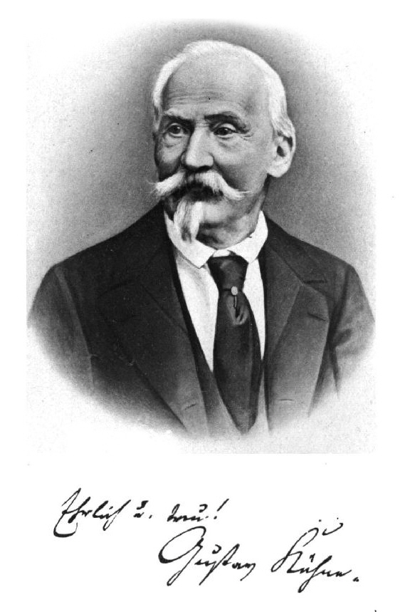 Portrait Gustav Kühne und Autograph „Ehrlich und treu! Gustav Kühne“